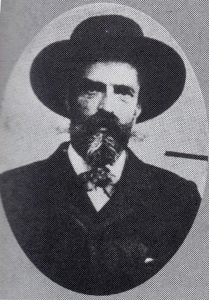 Fotografia di Camillo Prampolini, politico socialista italiano.